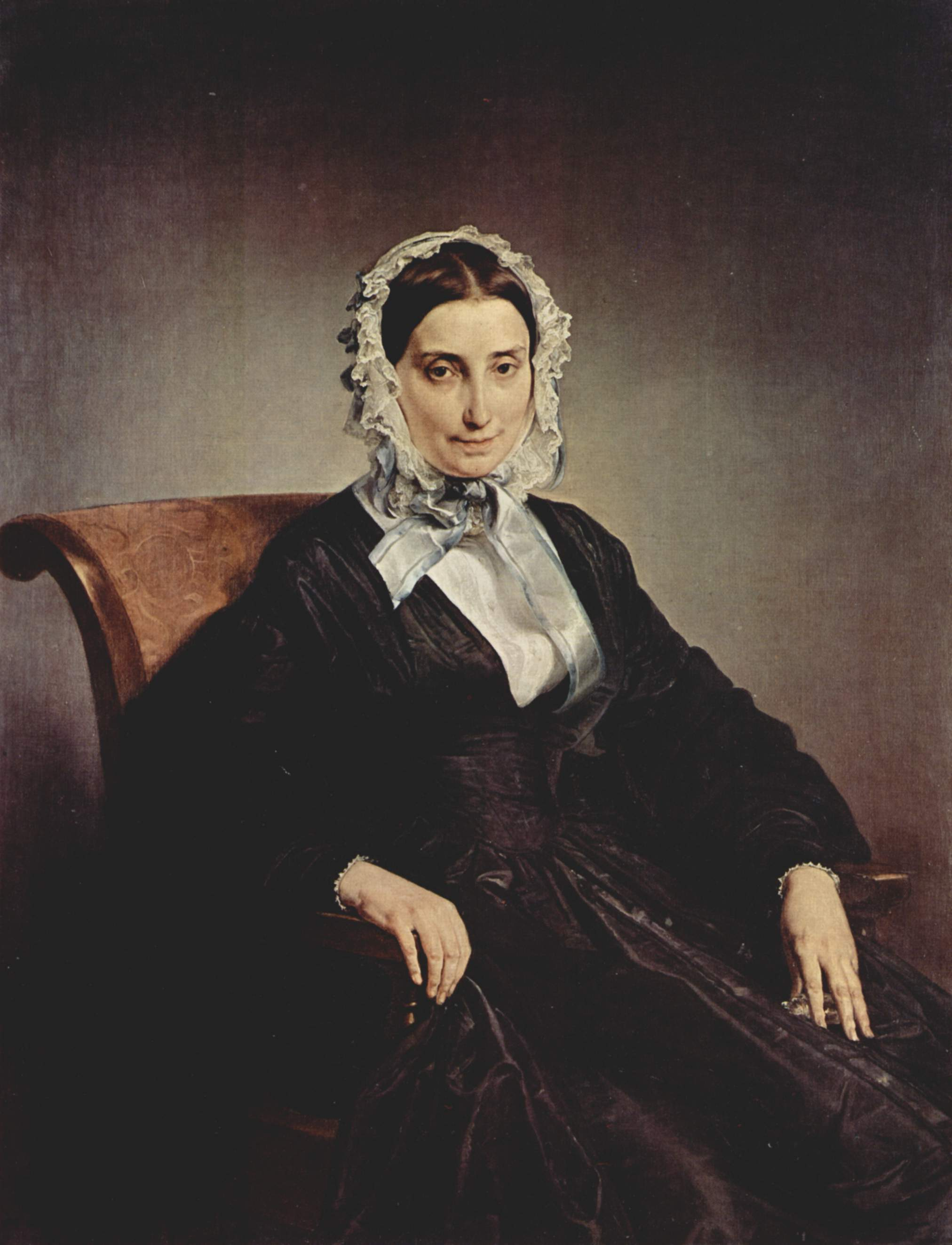 Depicted person: Teresa Manzoni Stampa Borri